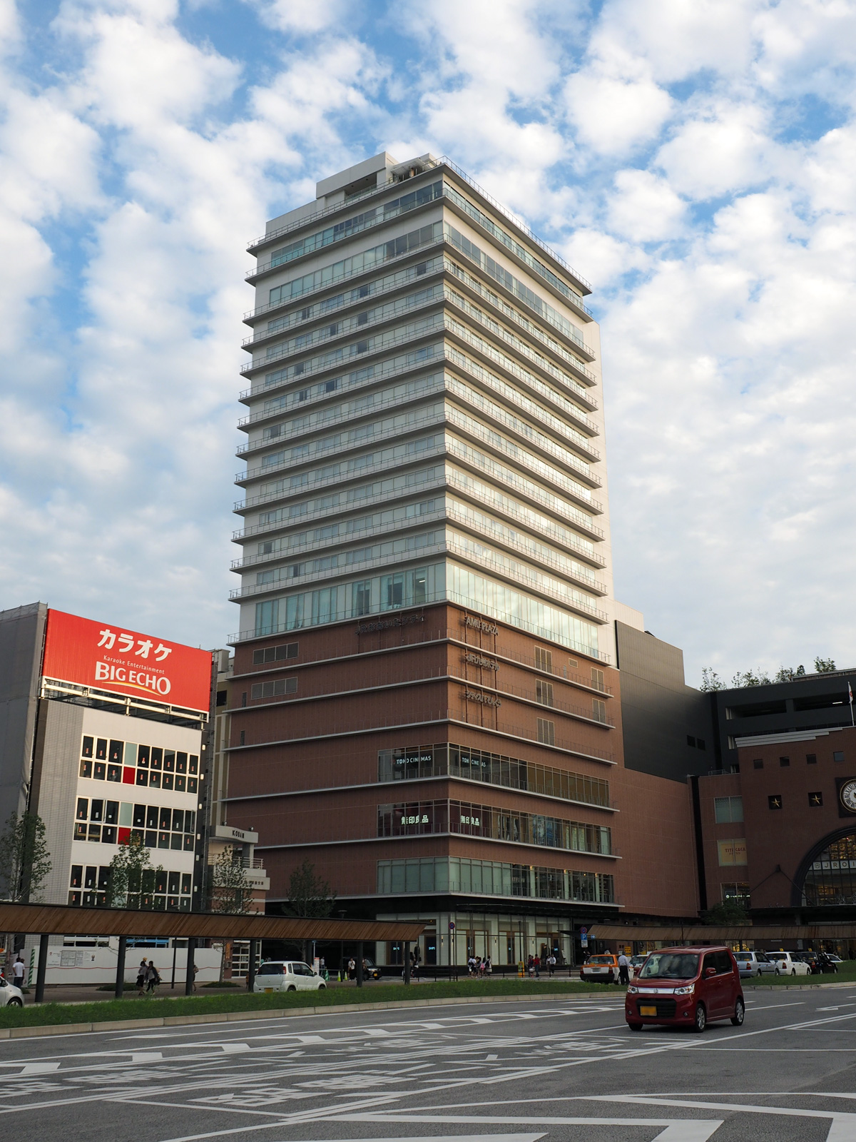 JR九州ホテルブラッサム大分（大分県大分市JR大分駅JRおおいたシティ）